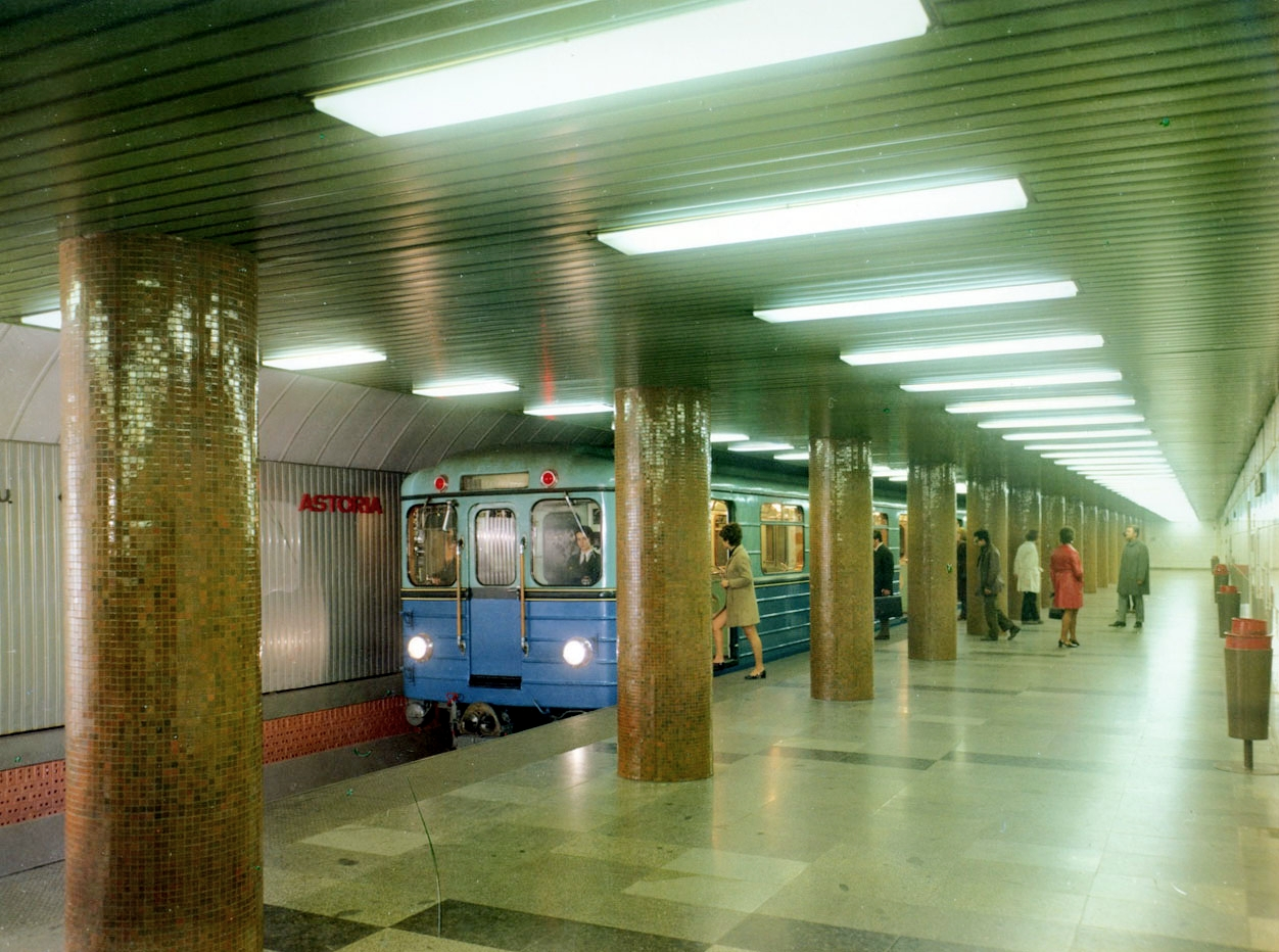 a metró Astoria állomása. Location: Hungary, Budapest Tags: colorful, subway, subway station Title: a metró Astoria állomása.